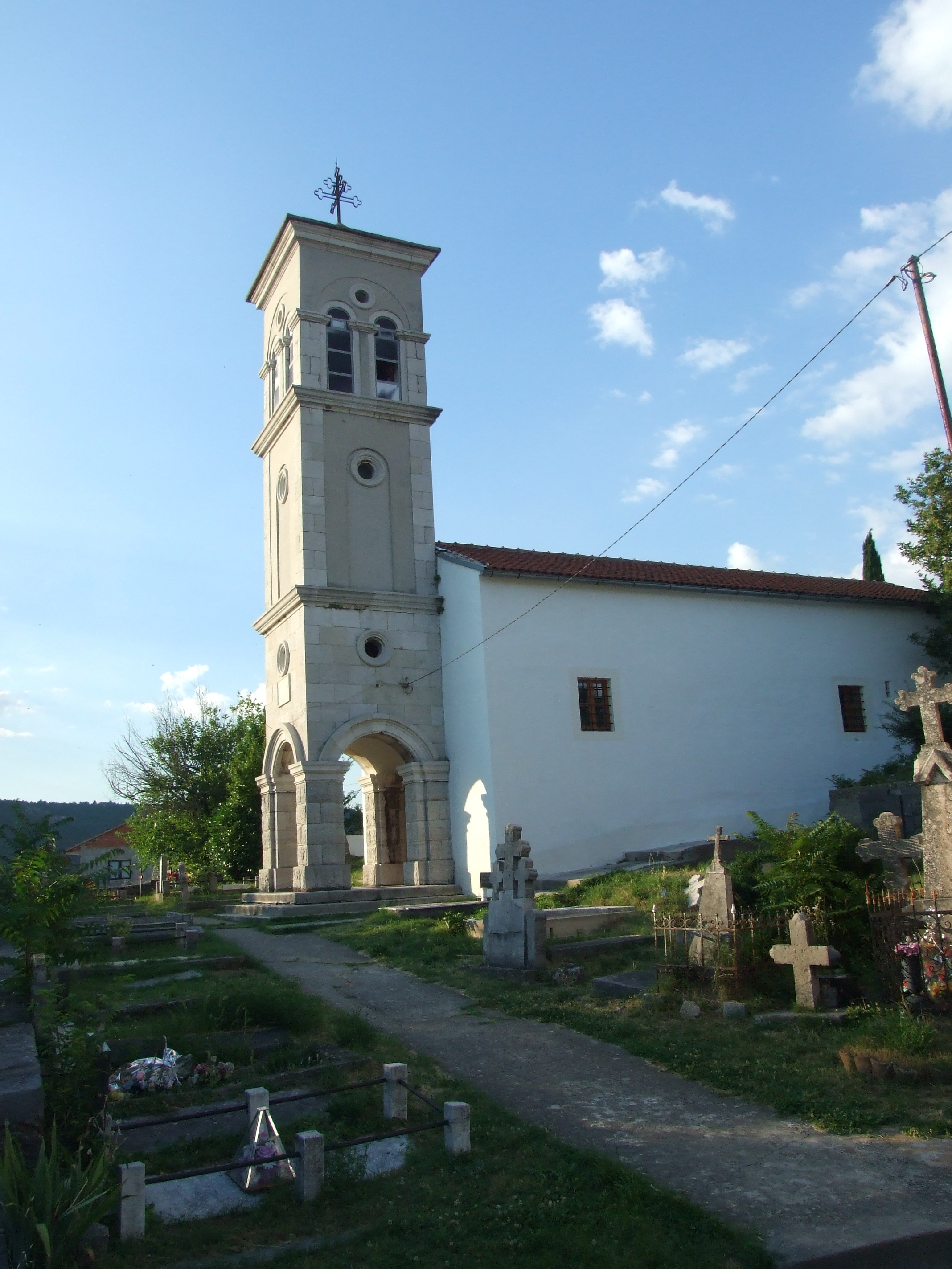 Knin, Hrvatska